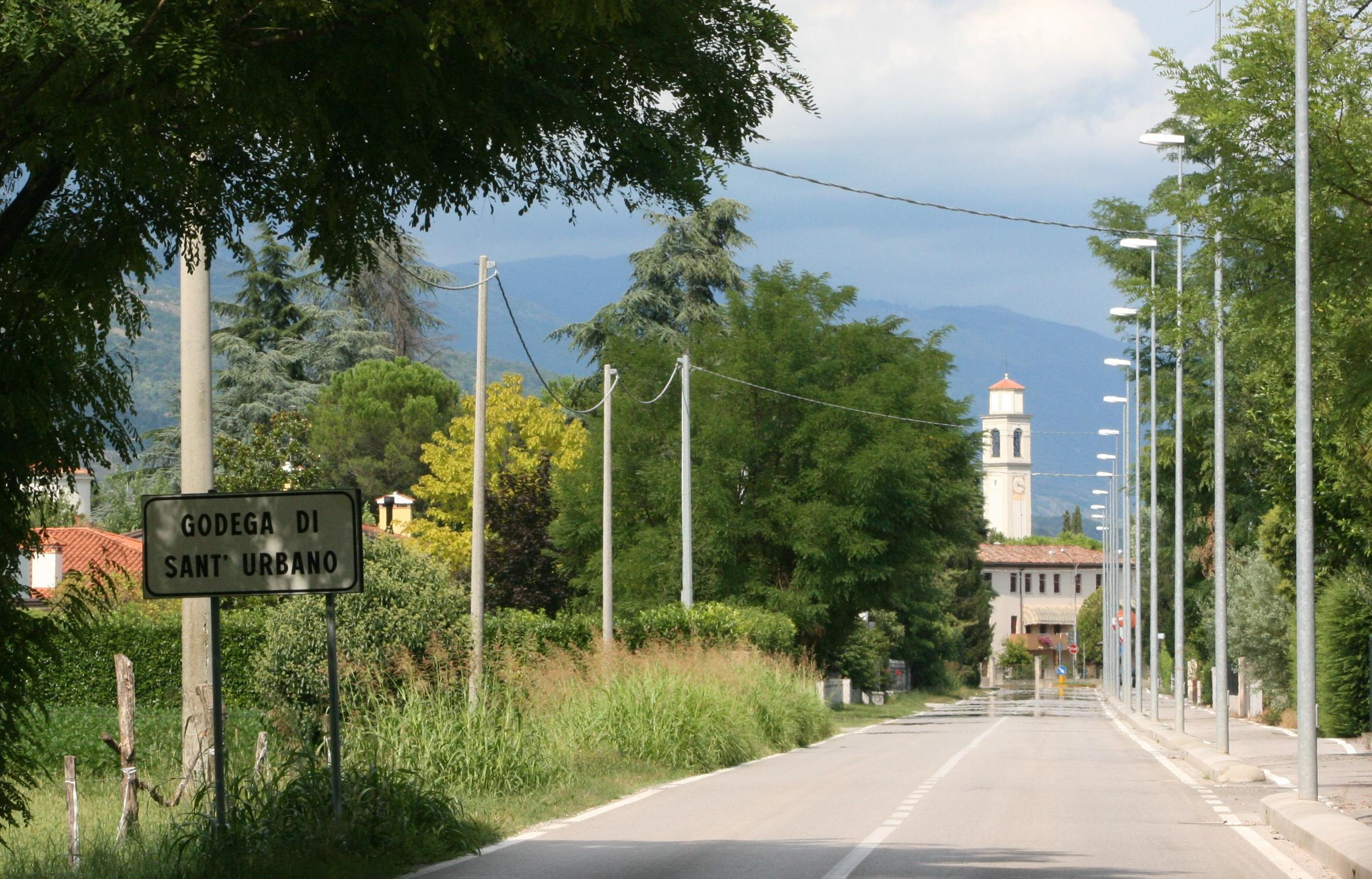 L'ingresso del paese con il campanile sullo sfondo